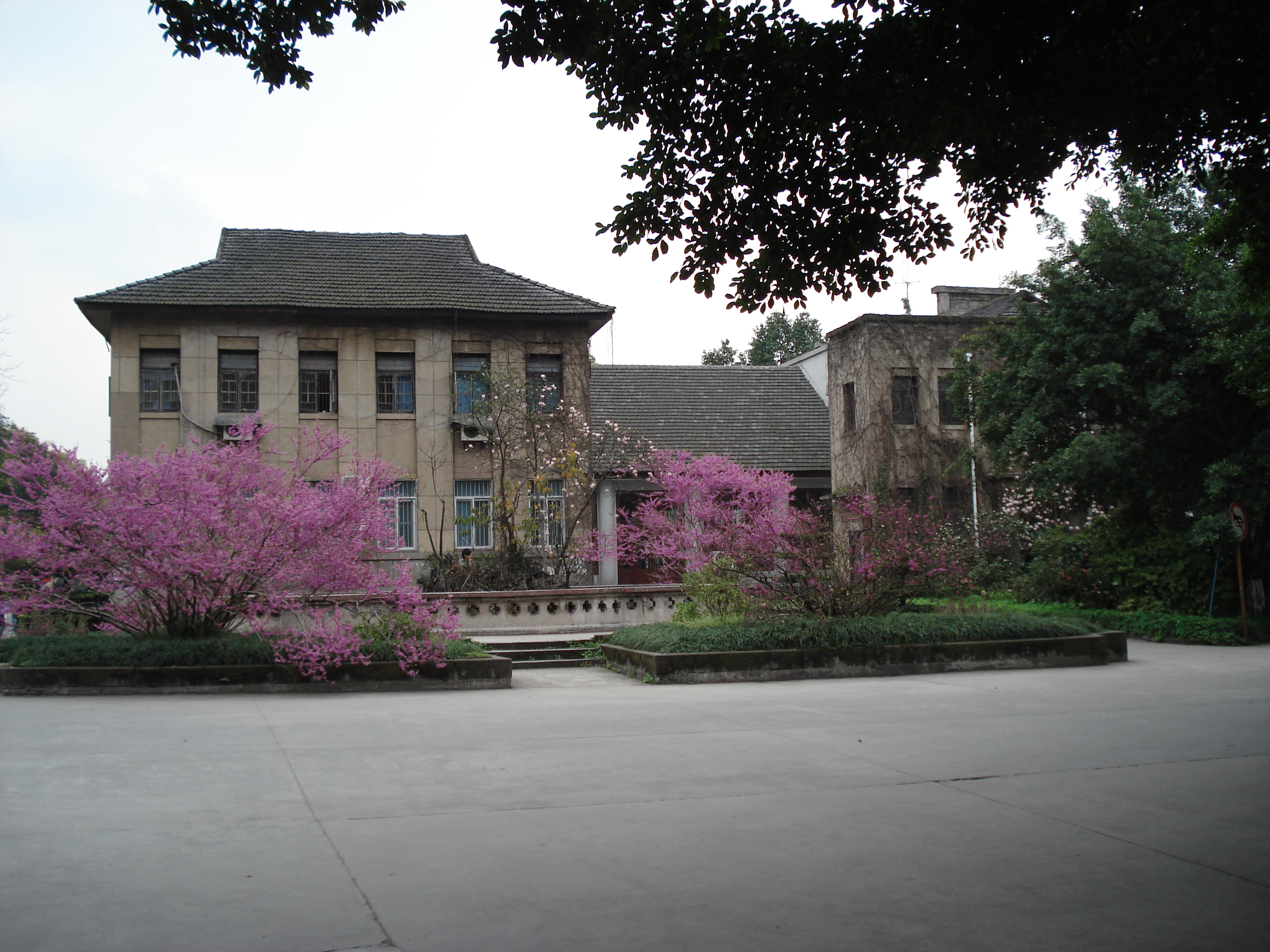 西南大學研究生院，原中國人民解放軍第五十一裝備研究所建築。